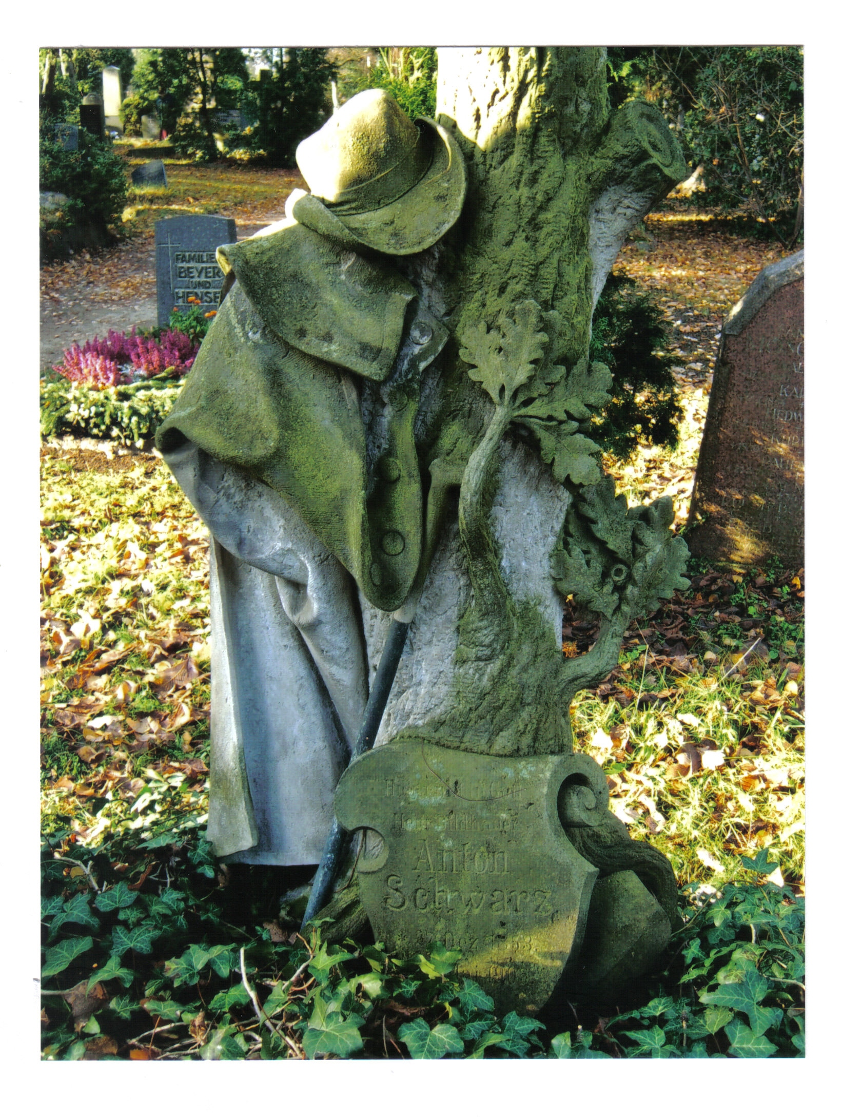 Baum des Lebens, Künstlerhut und Mantel mit Bildhauerwerkzeug